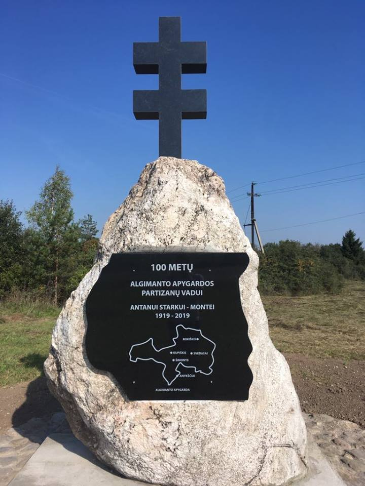 Antano Starkaus-Montės atminimo paminklas